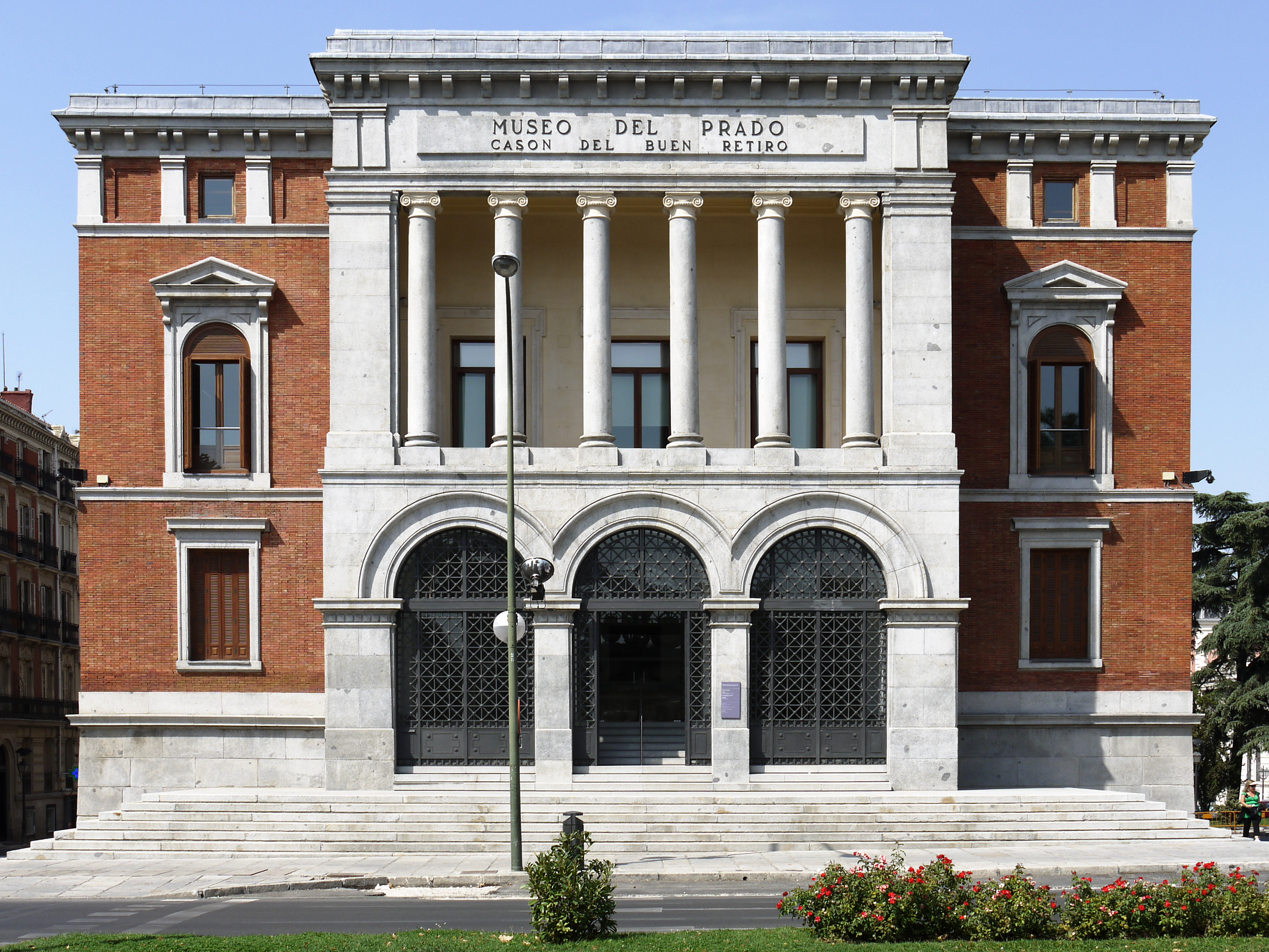 Casón del Buen Retiro, Madrid, España.